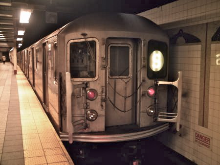 Shuttle de la calle 42 del metro de Nueva York